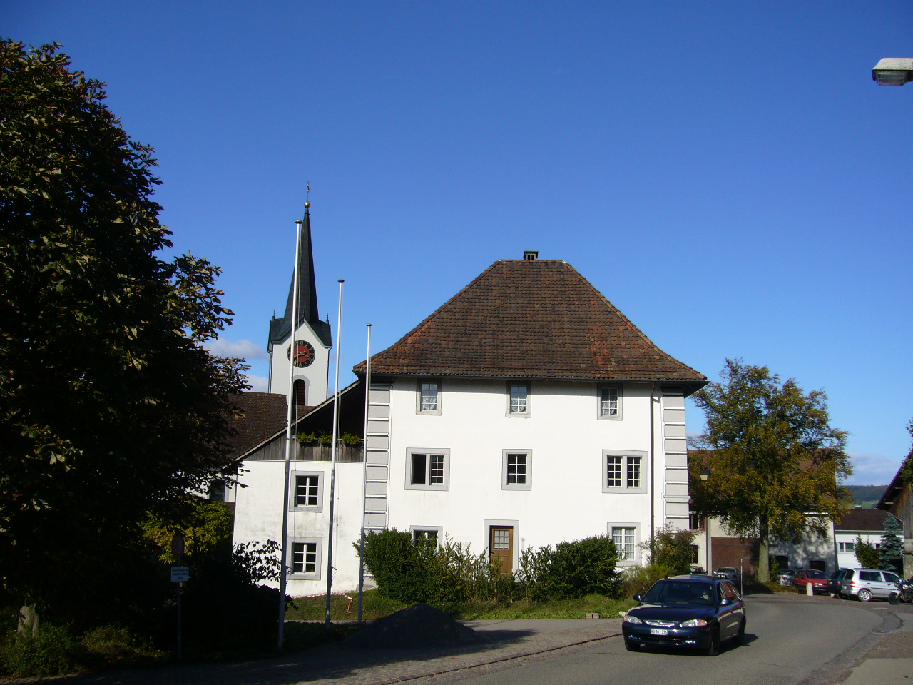 Vogthaus in Ehrendingen, Canton of Aargau, Switzerland. Picture taken by Peter Berger, October 7, 2006.